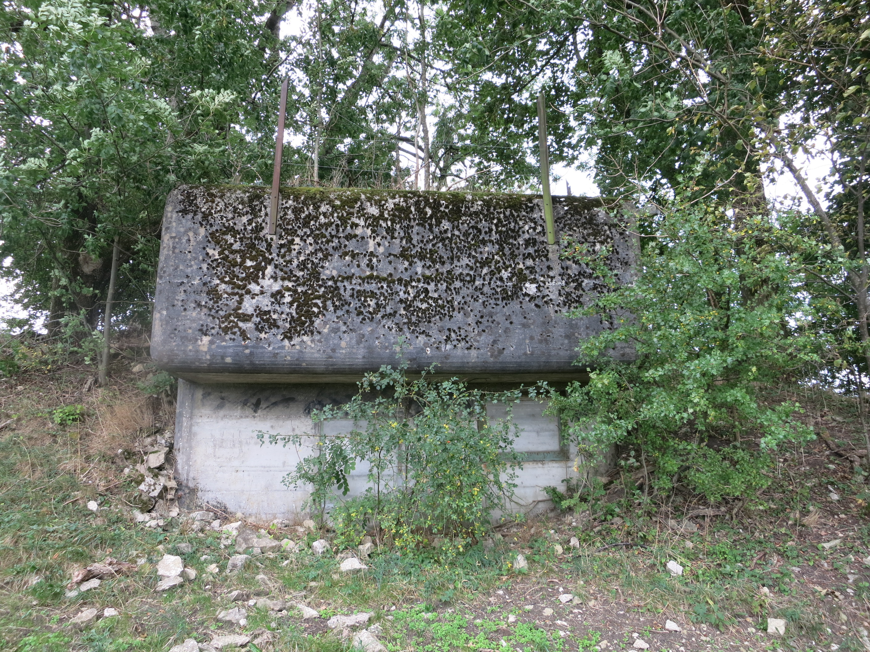 Artilleriestellung Reisen-Pulfisei, Läufelfingen BL, Schweiz